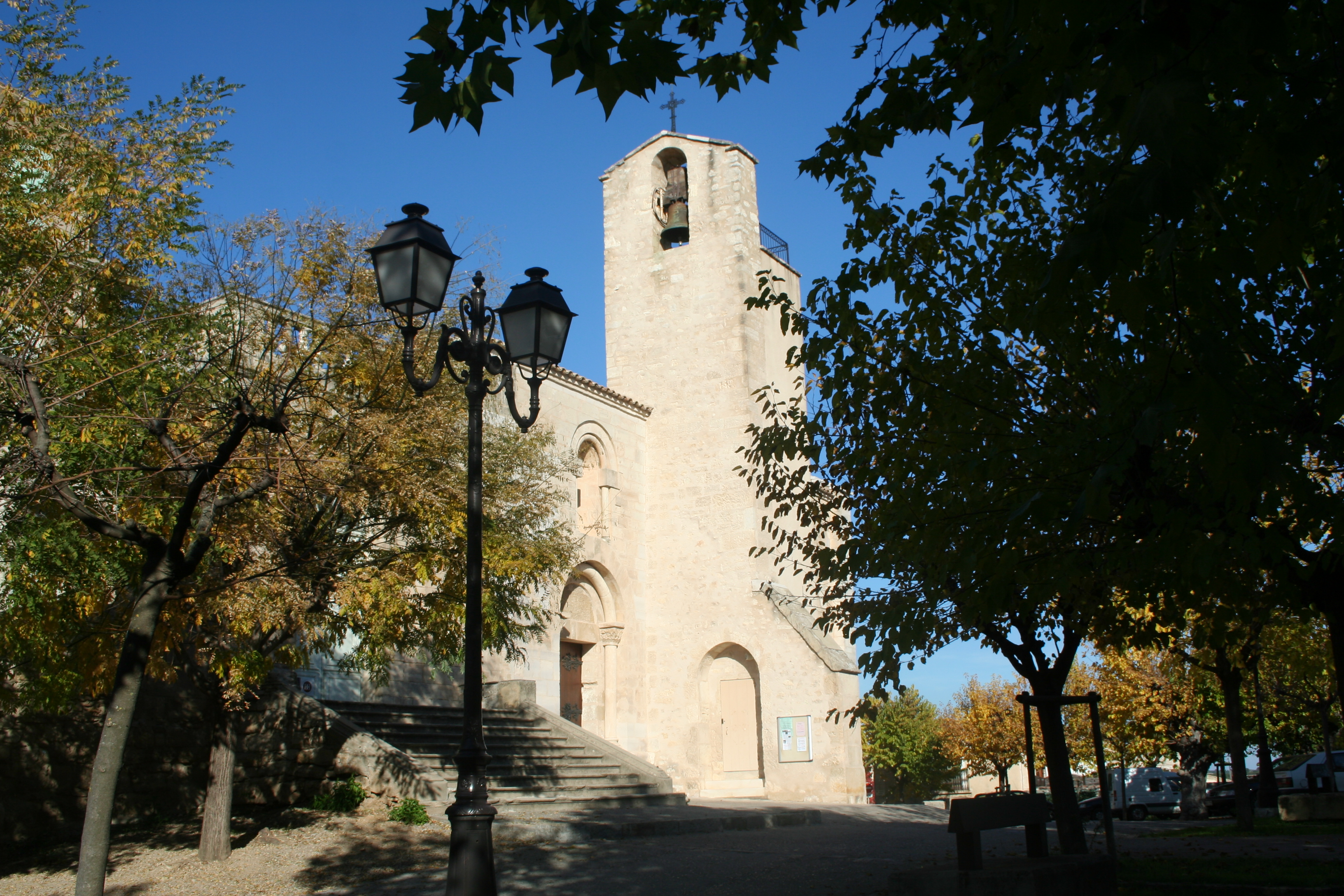 Assas (Hérault) - église Saint-Martial.